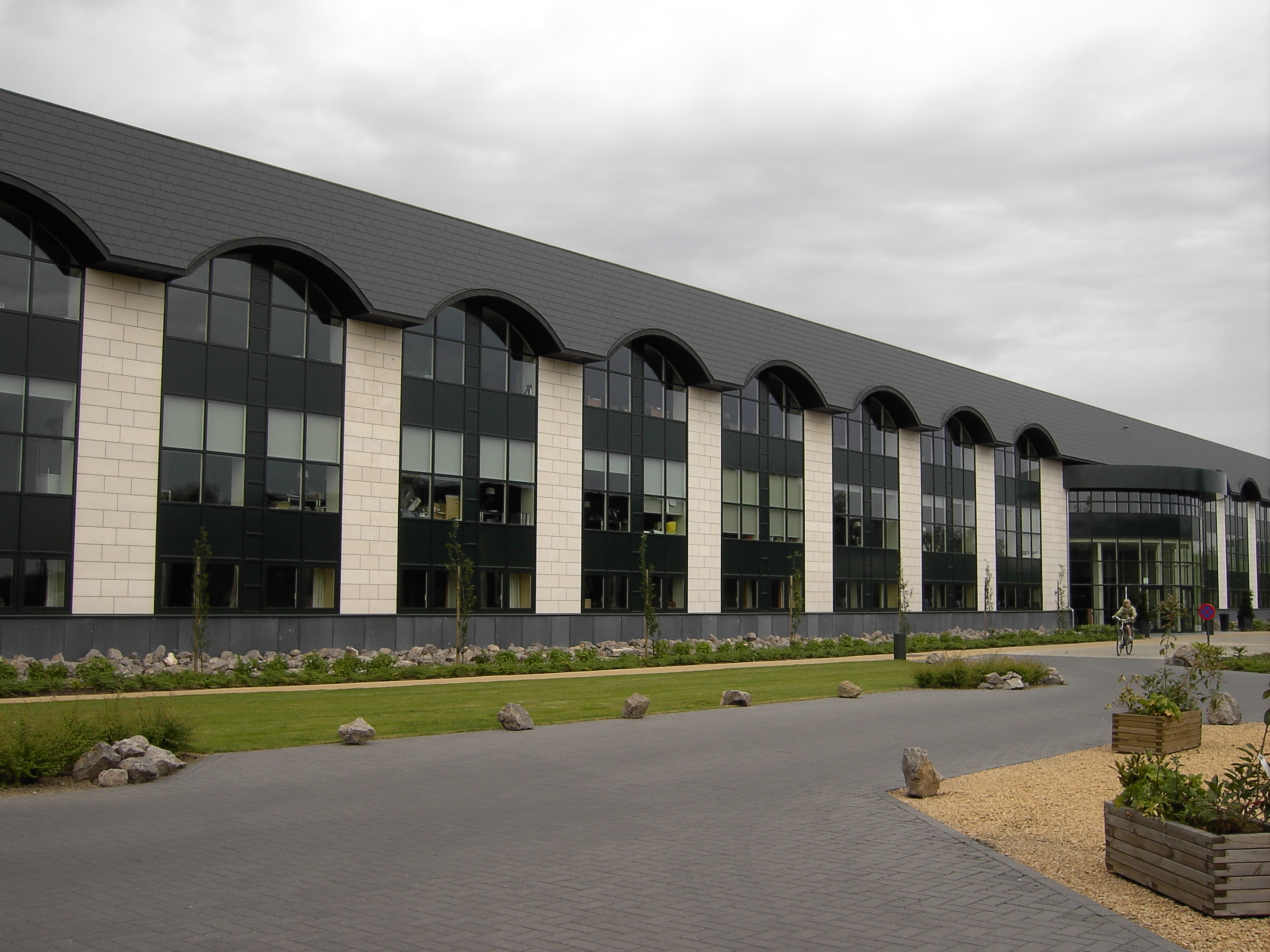 Gebouw van Alfacam. Gebouw van het Eurocam Media Center.